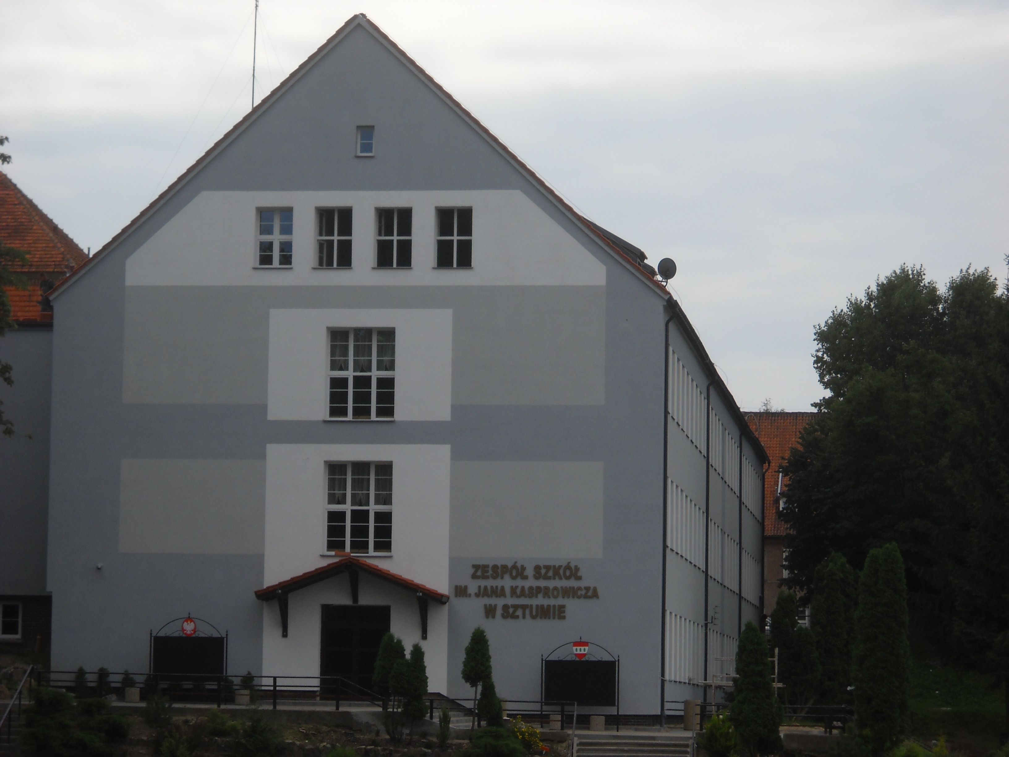 Sztum, ul. Kasprowicza 3 - Zespół Szkół